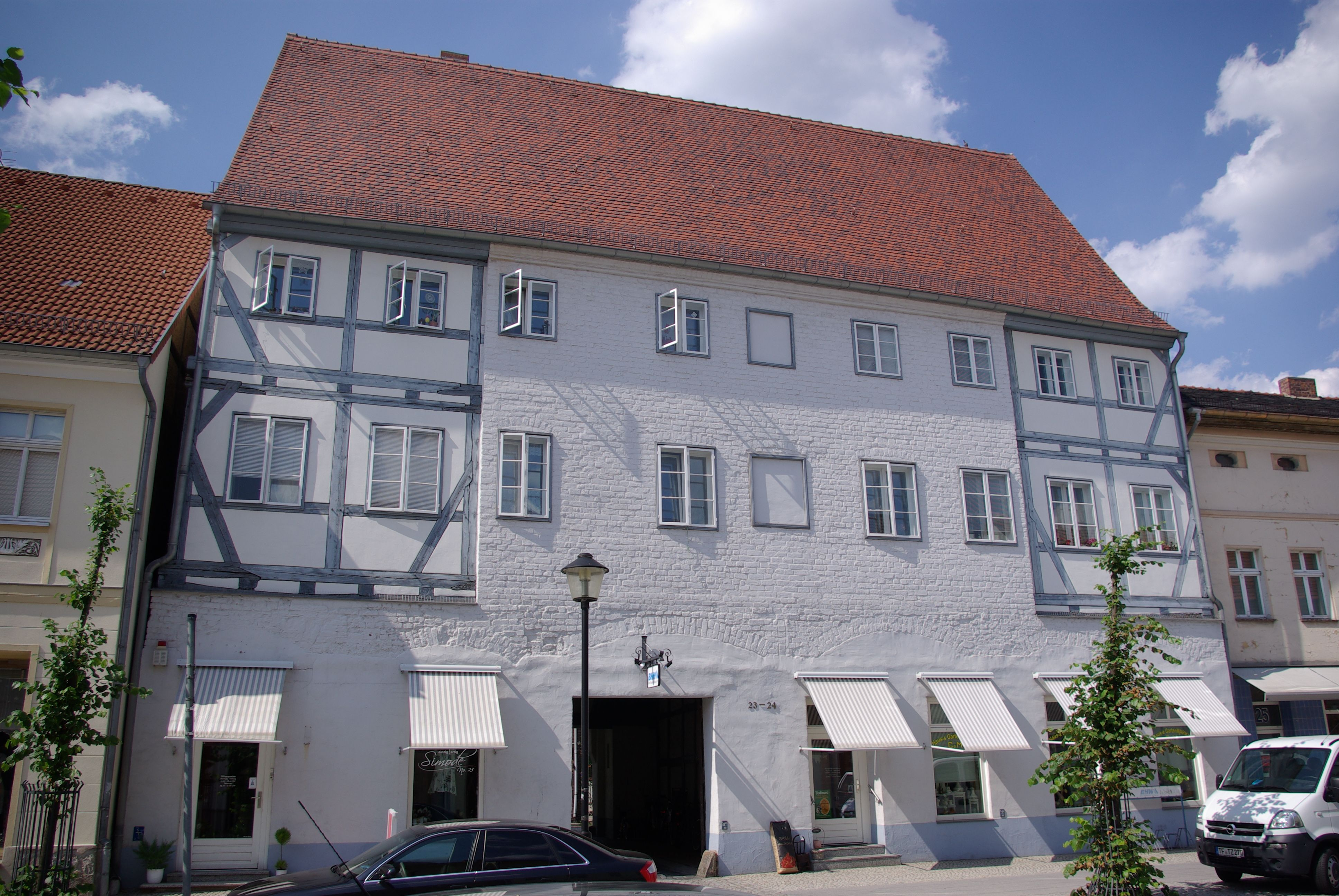 Jüterbog in Brandenburg. Das Haus in der Jüterboger Straße 23 / 24 steht unter Denkmalschutz.